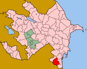 Map of Azerbaijan showing Lerik rayon.